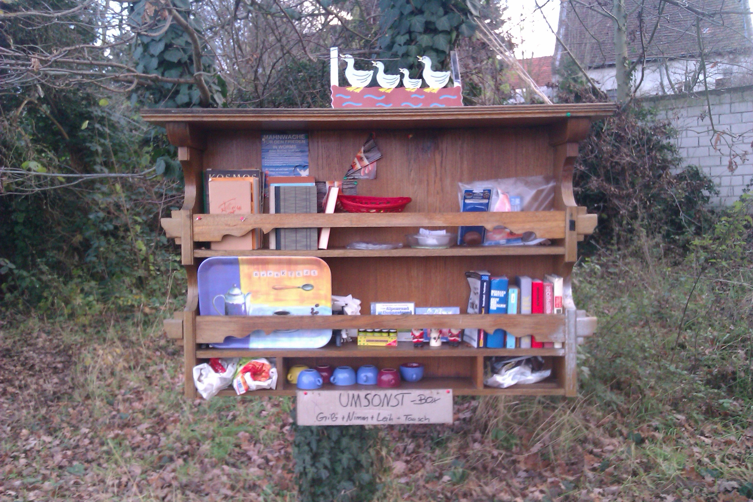 Eine „Give-Box“ ("Umsonst-Box") in Worms